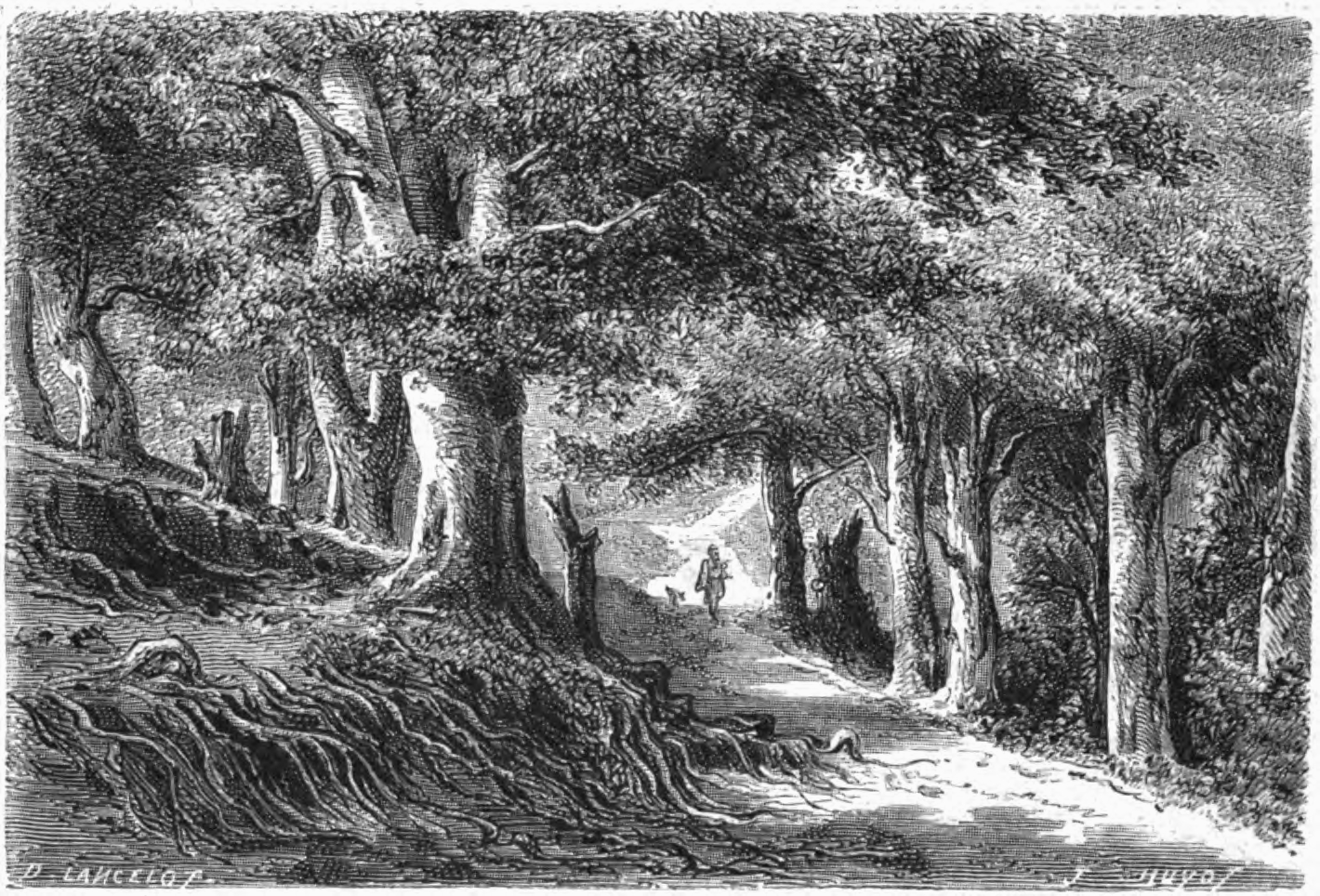 Forêt à Baia-de-Fier, Olténie, Valachie, Roumanie